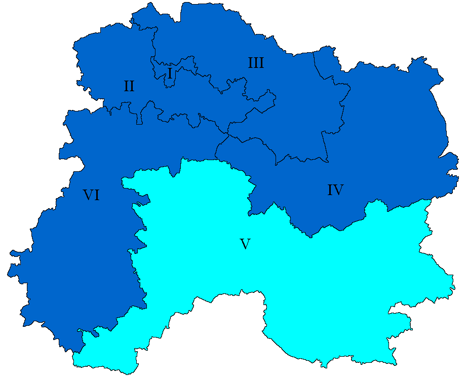 Députés de la Marne en 2007